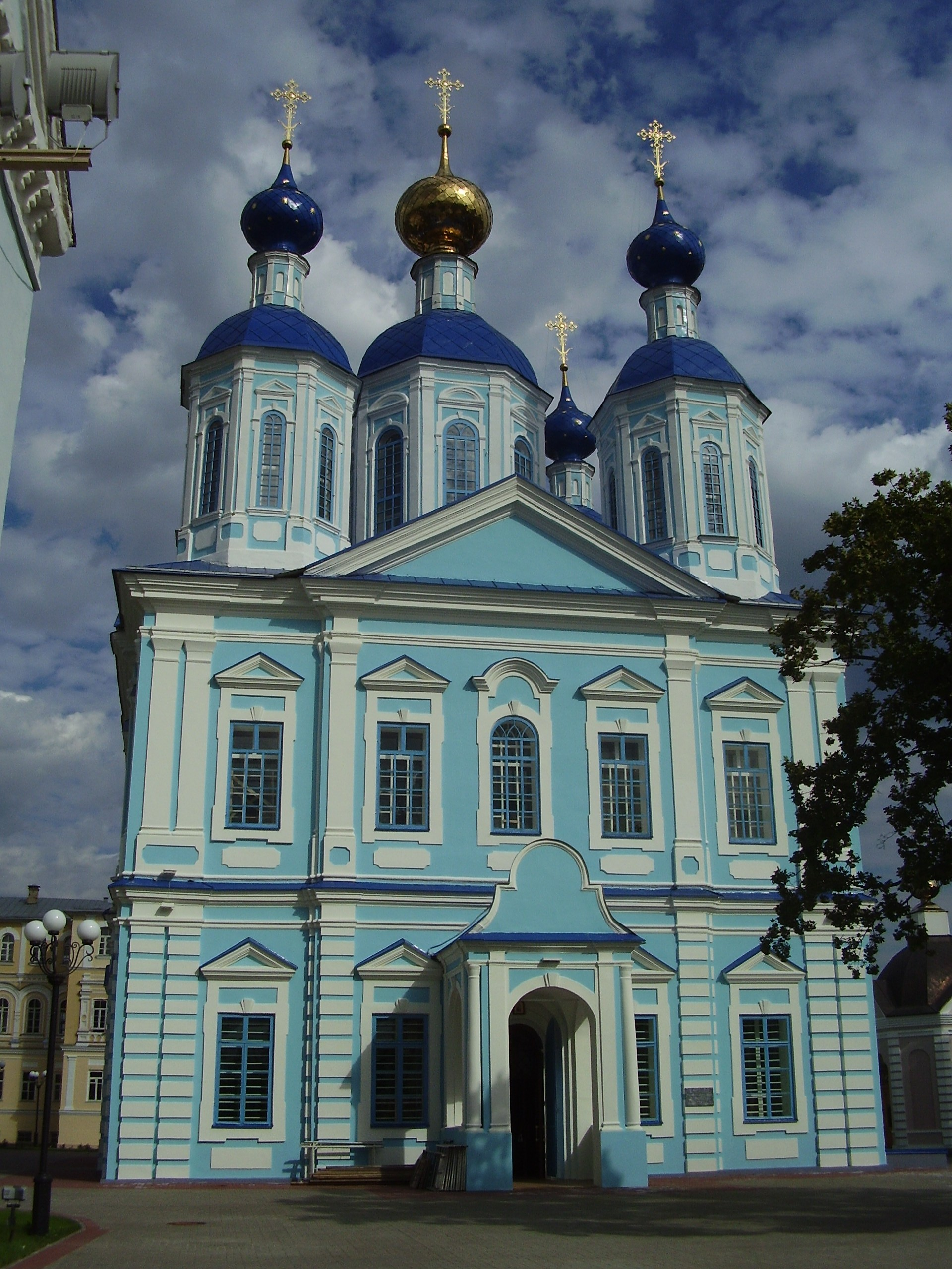 Тамбов,Казанская церковь(Казанской иконы Божьей Матери)